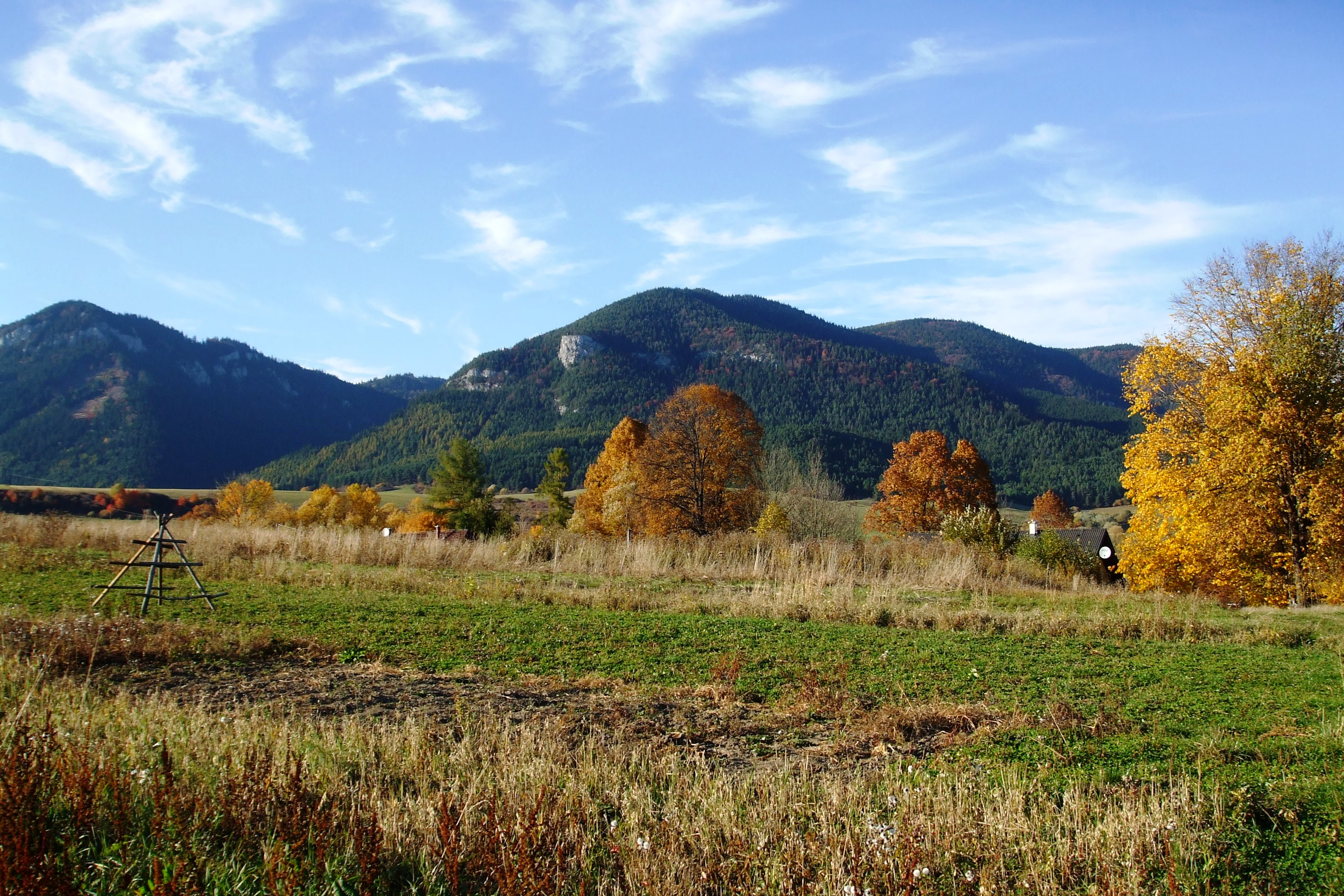 krajina